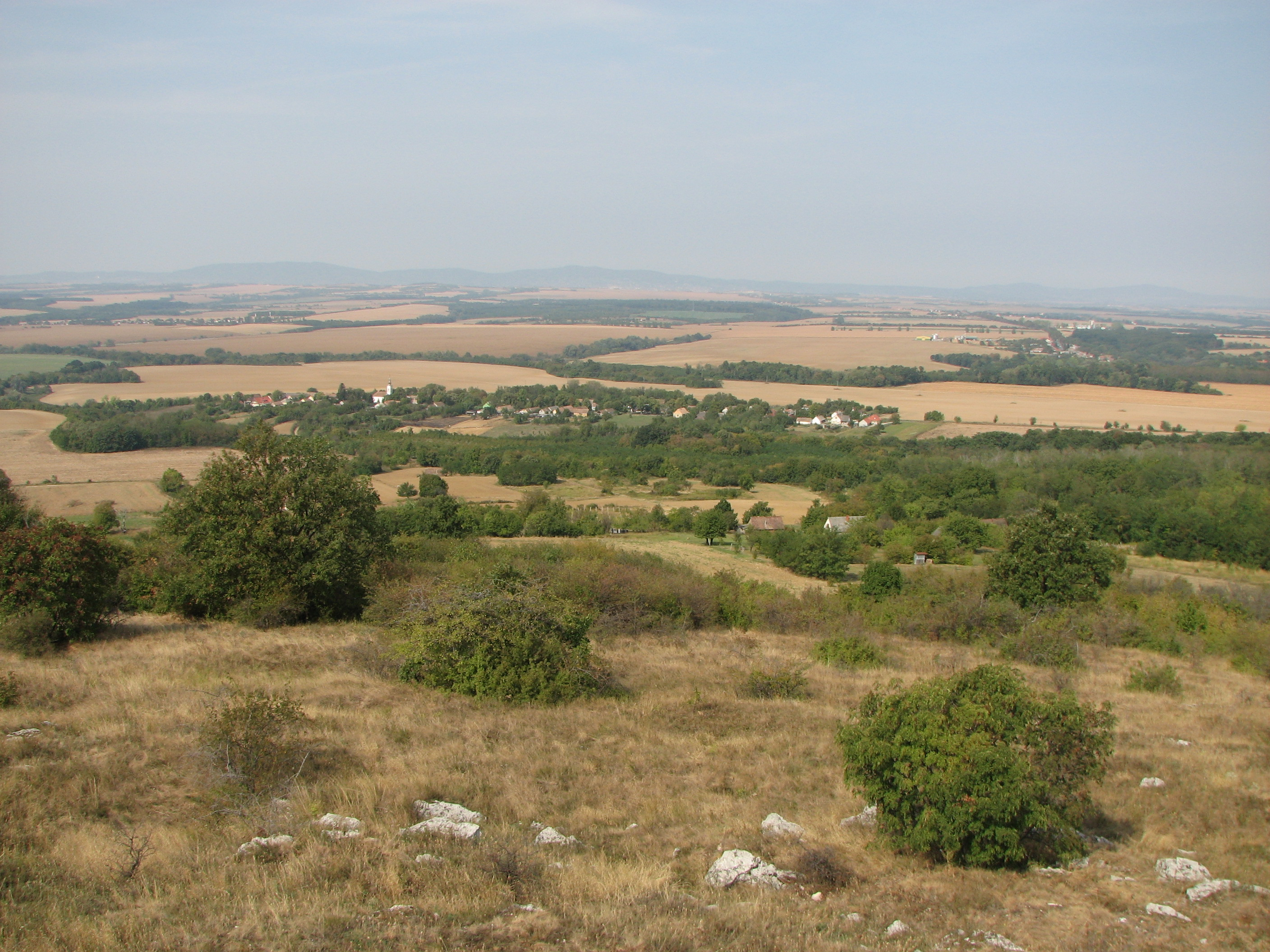 Csarnóta_a_Kopasz-hegyről_nézve